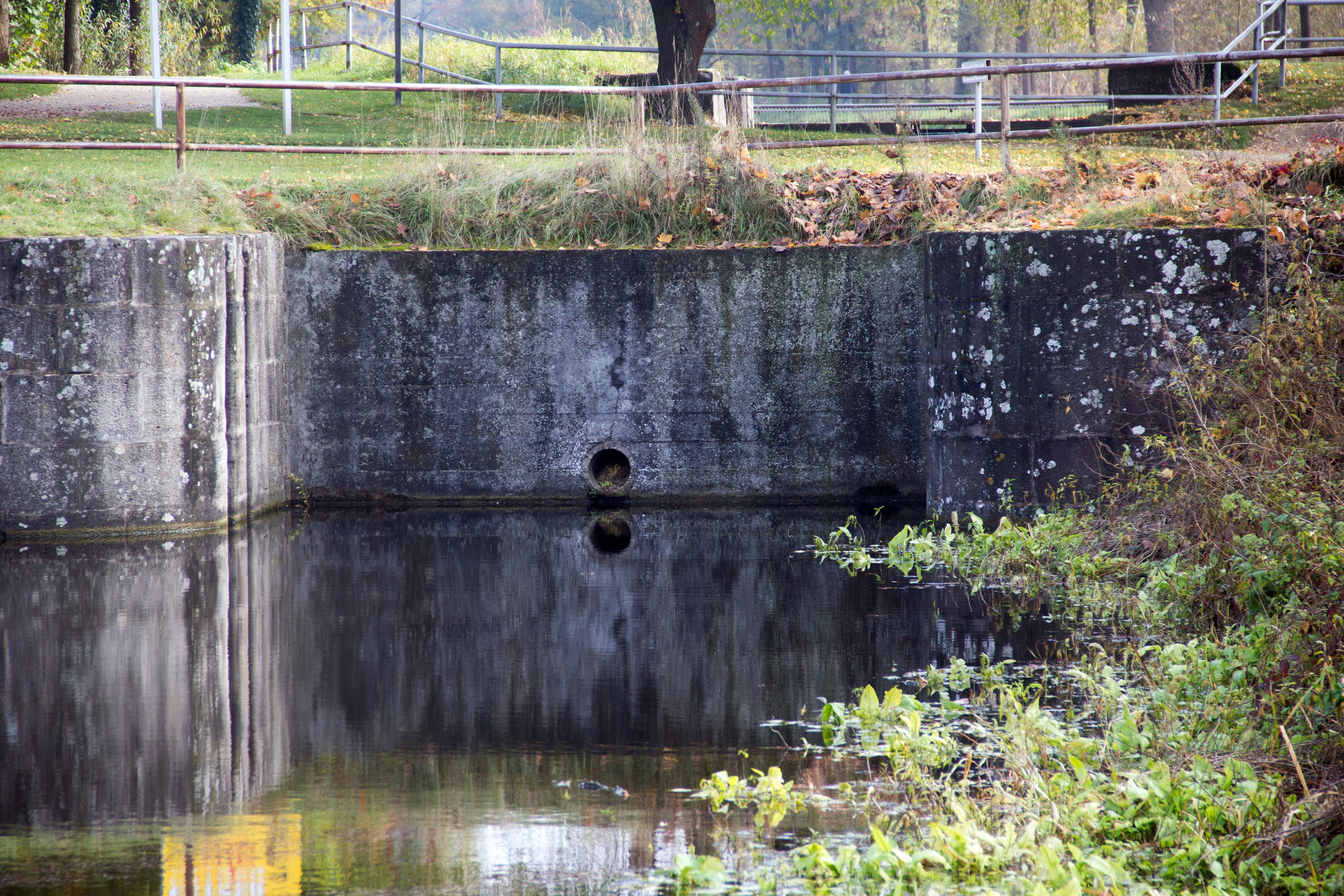 Ludwig-Donau-Main-Kanal. Schleuse 67